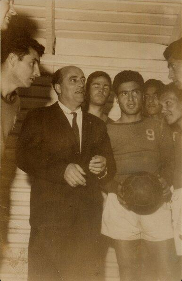 Fotografía de José "Gallego" Pérez, entrenador de fútbol argentino. Fotografía de los años 50' entregada por familiares.